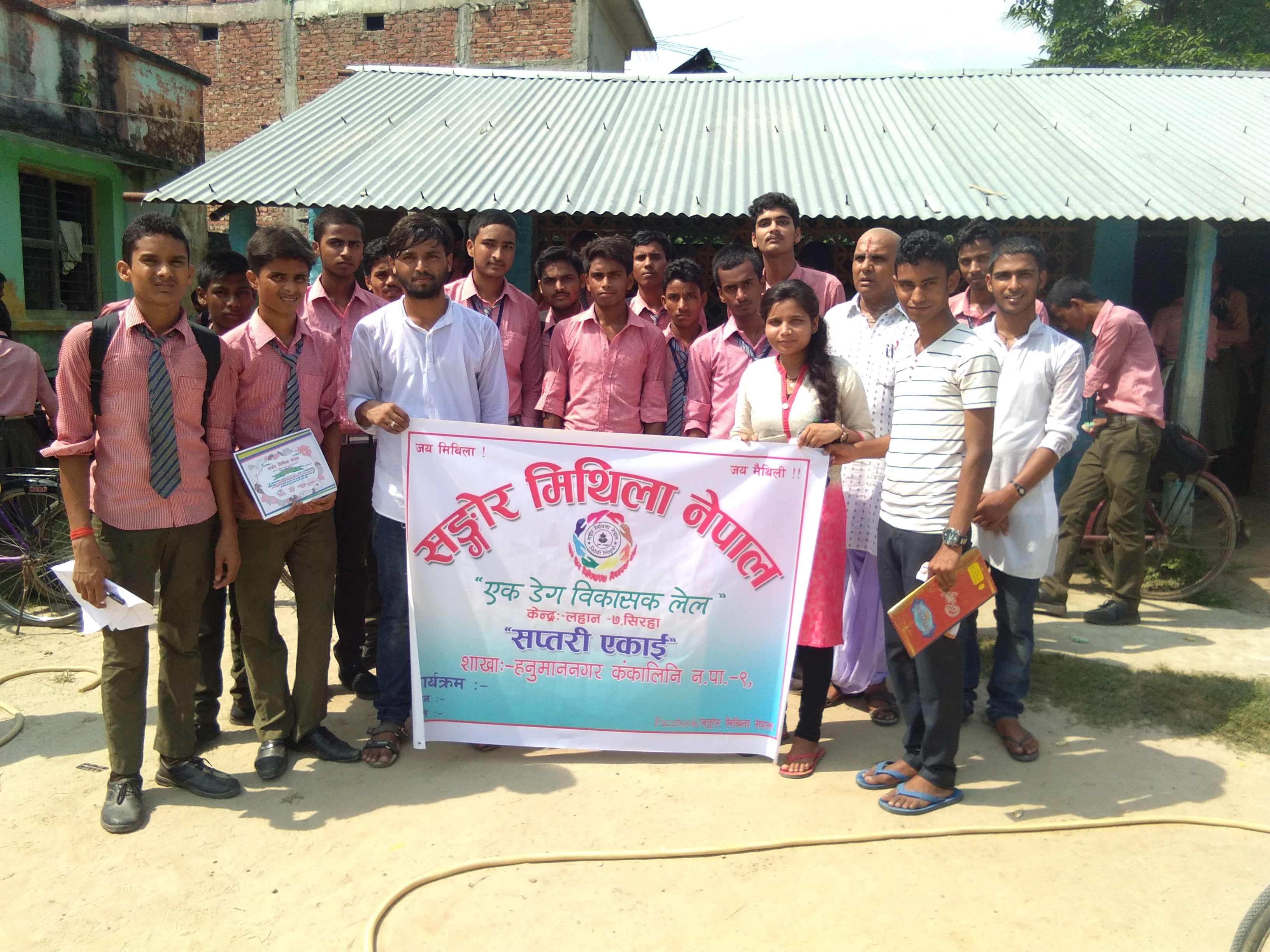 सङ्गाेर मिथिला नेपाल